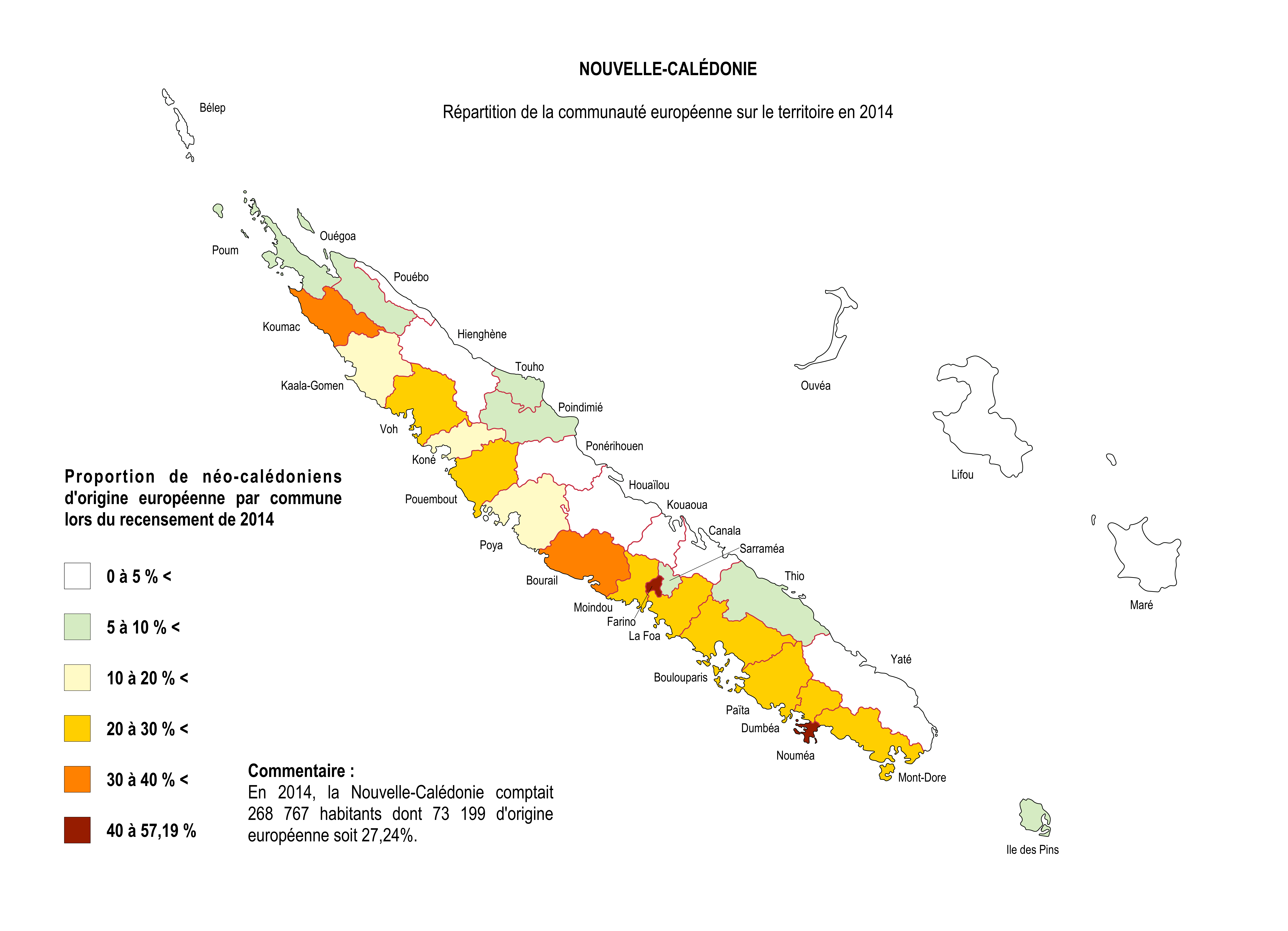 Répartition de la communauté européenne sur le territoire de Nouvelle-Calédonie tel qu'issu des données du recensement de 2014.